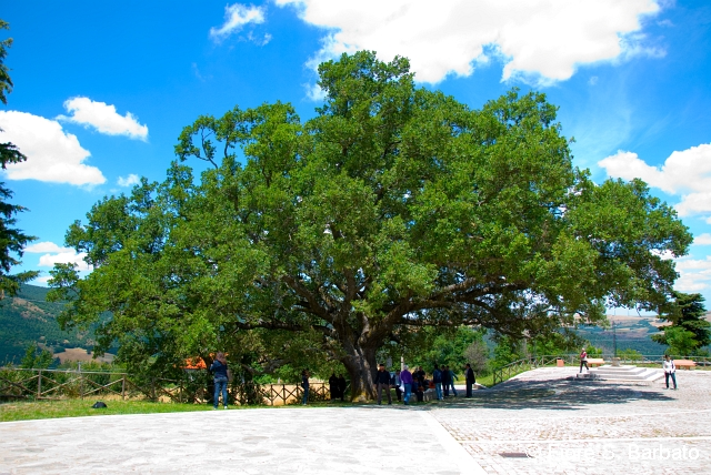 Quercia monumentale (Aquilonia)